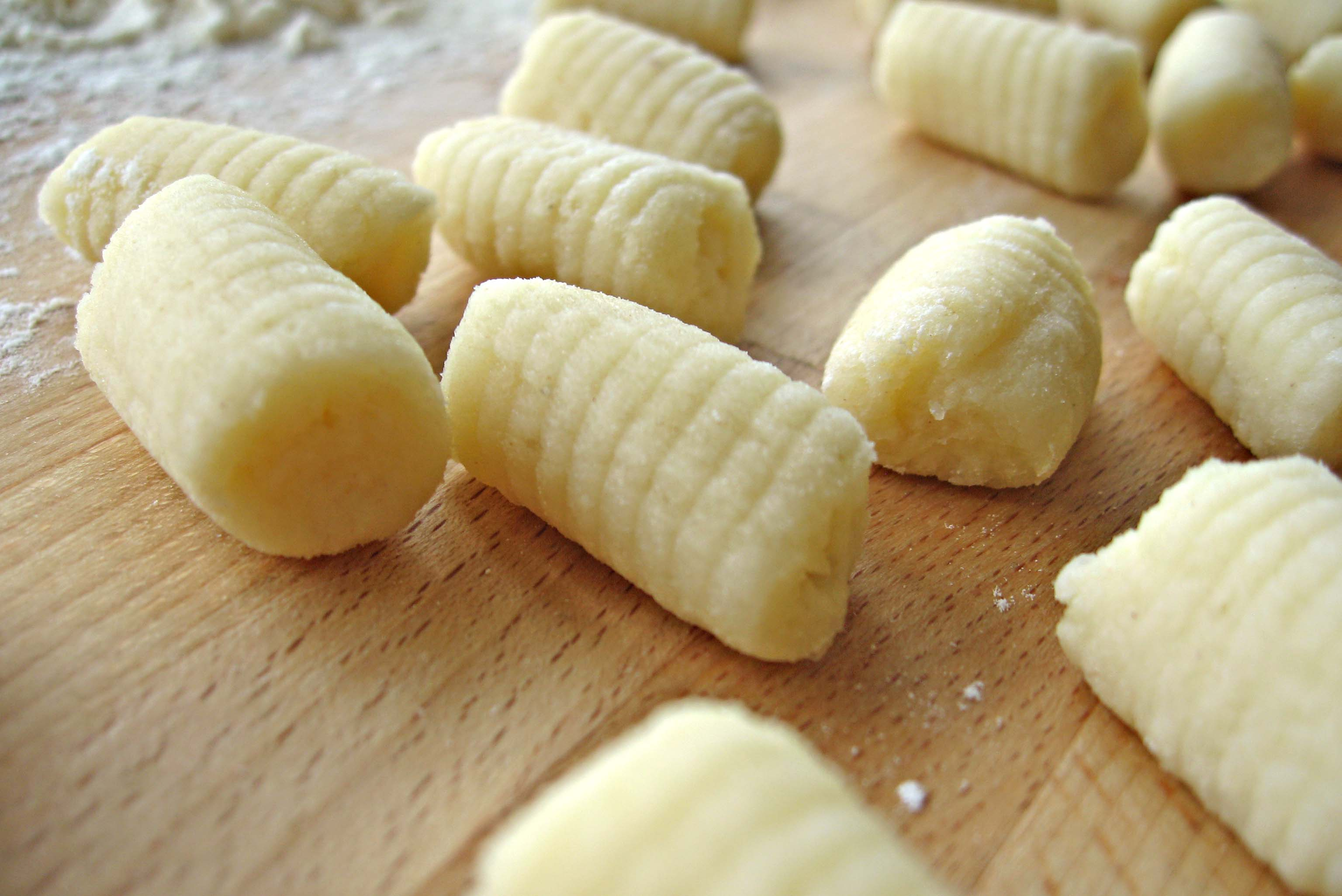 Potato Gnocchi